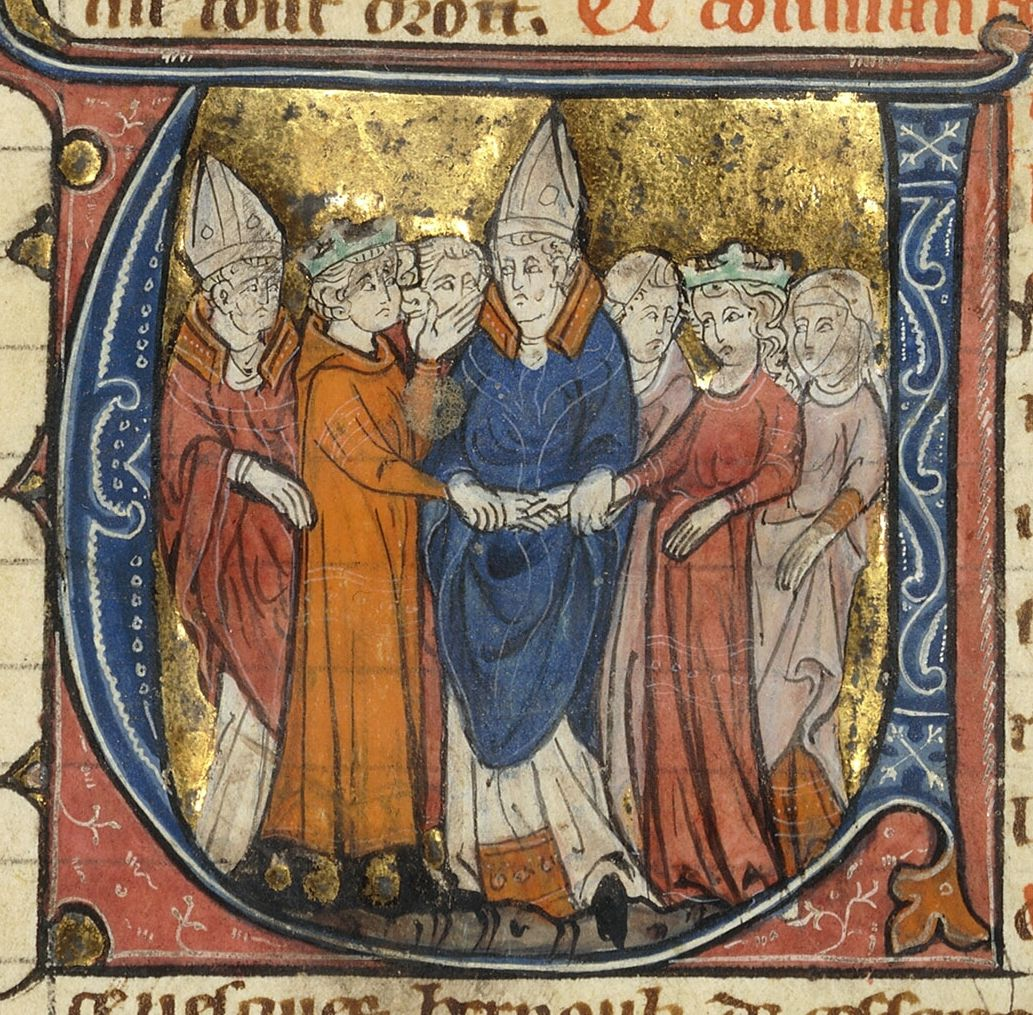 Mariage d'Amaury Ier et de Marie Comnène